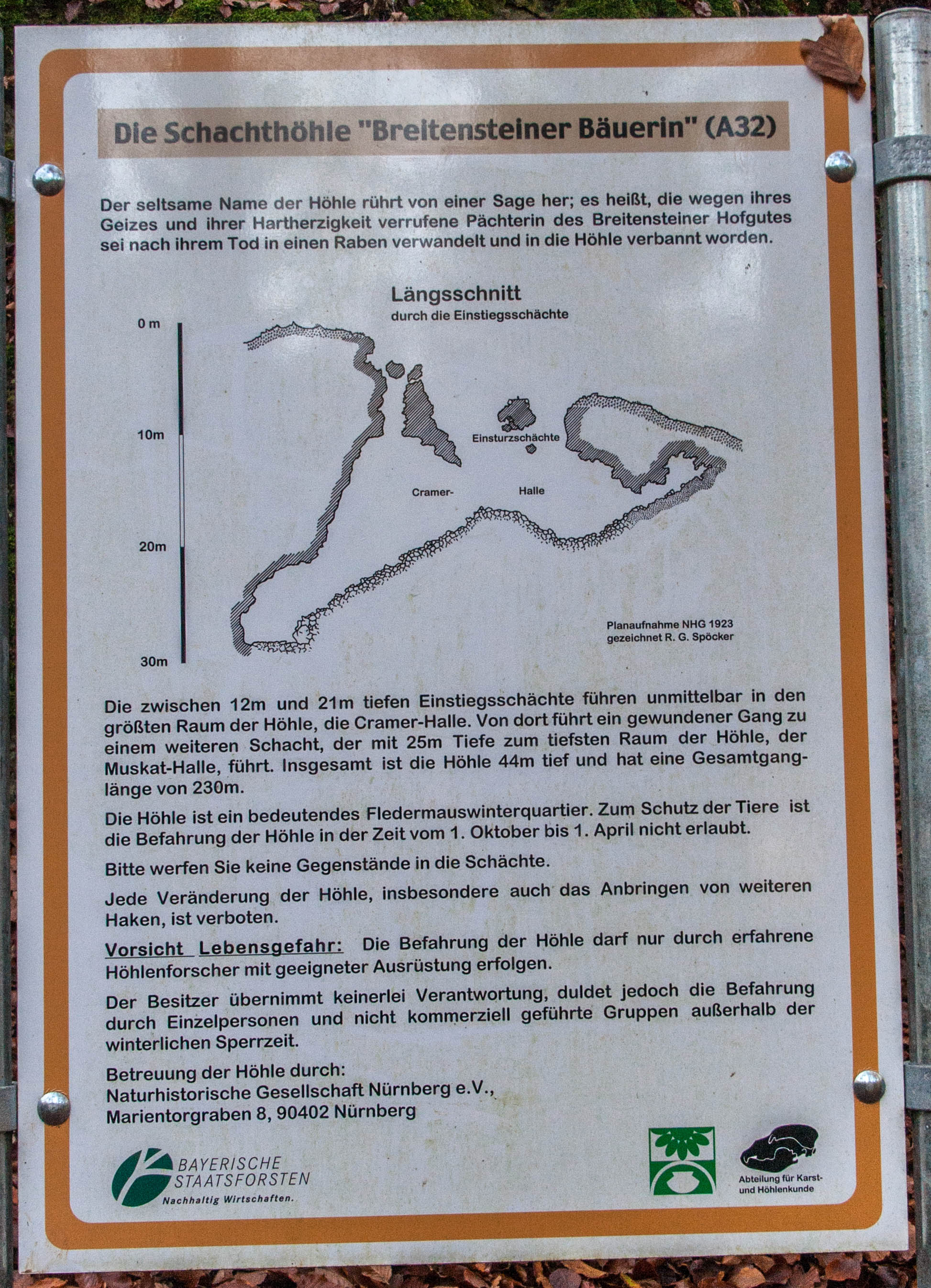 Breitensteiner Bäuerin, Höhle, A 32, Königstein